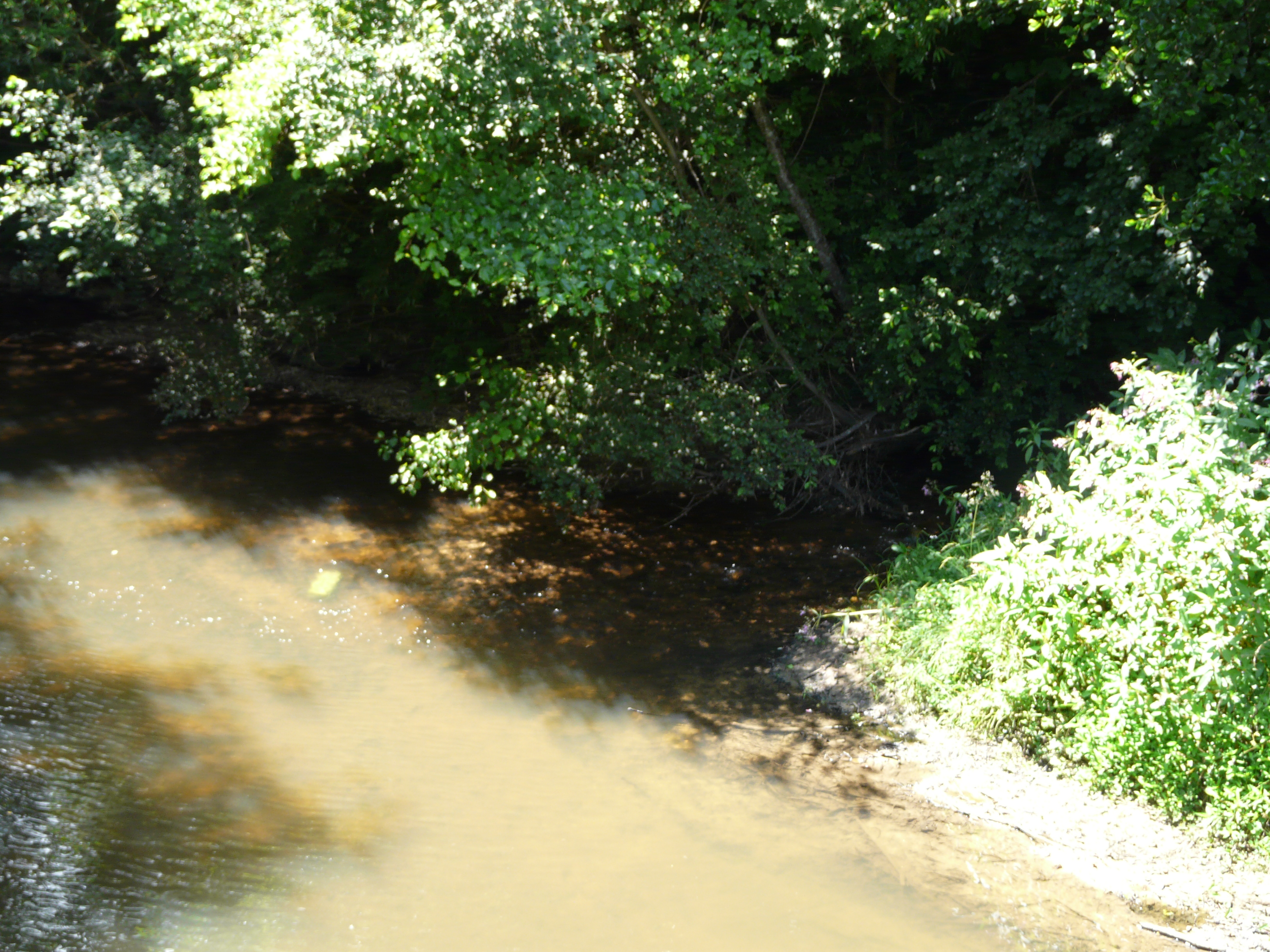 L'Isle au niveau de sa confluence avec le Périgord (provenant de la droite), en aval de la route départementale 79, lieu-dit la Faye, Jumilhac-le-Grand, Dordogne, France.